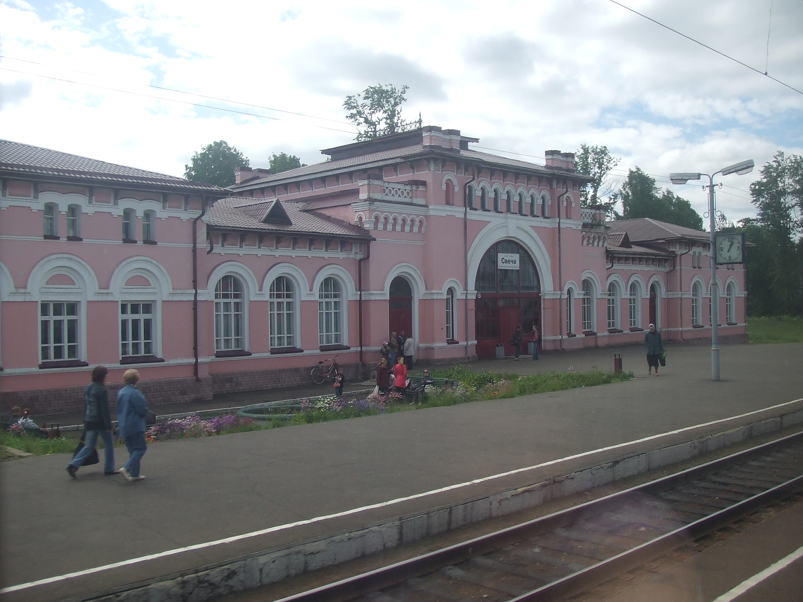 Вокзал Свеча